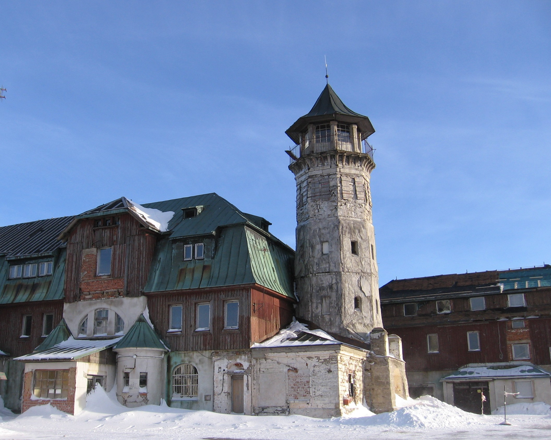 Aussichtsturm am ehemaligen Keilberghotel auf dem Klínovec